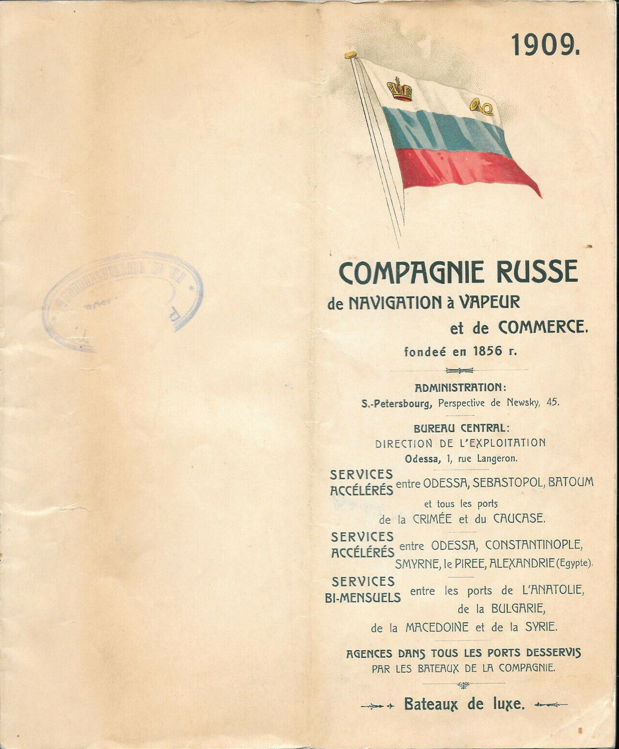 ROPiT: Werbeschrift / Fahrpläne von 1909, Frontcover